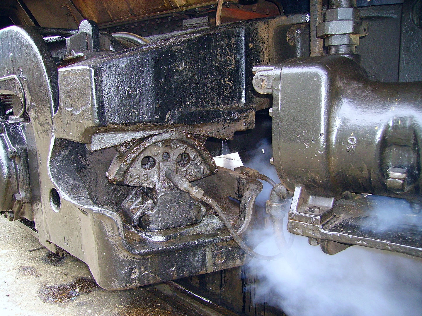 Un des deux osselets de rappel du bissel Delta de la 141 R 1199.